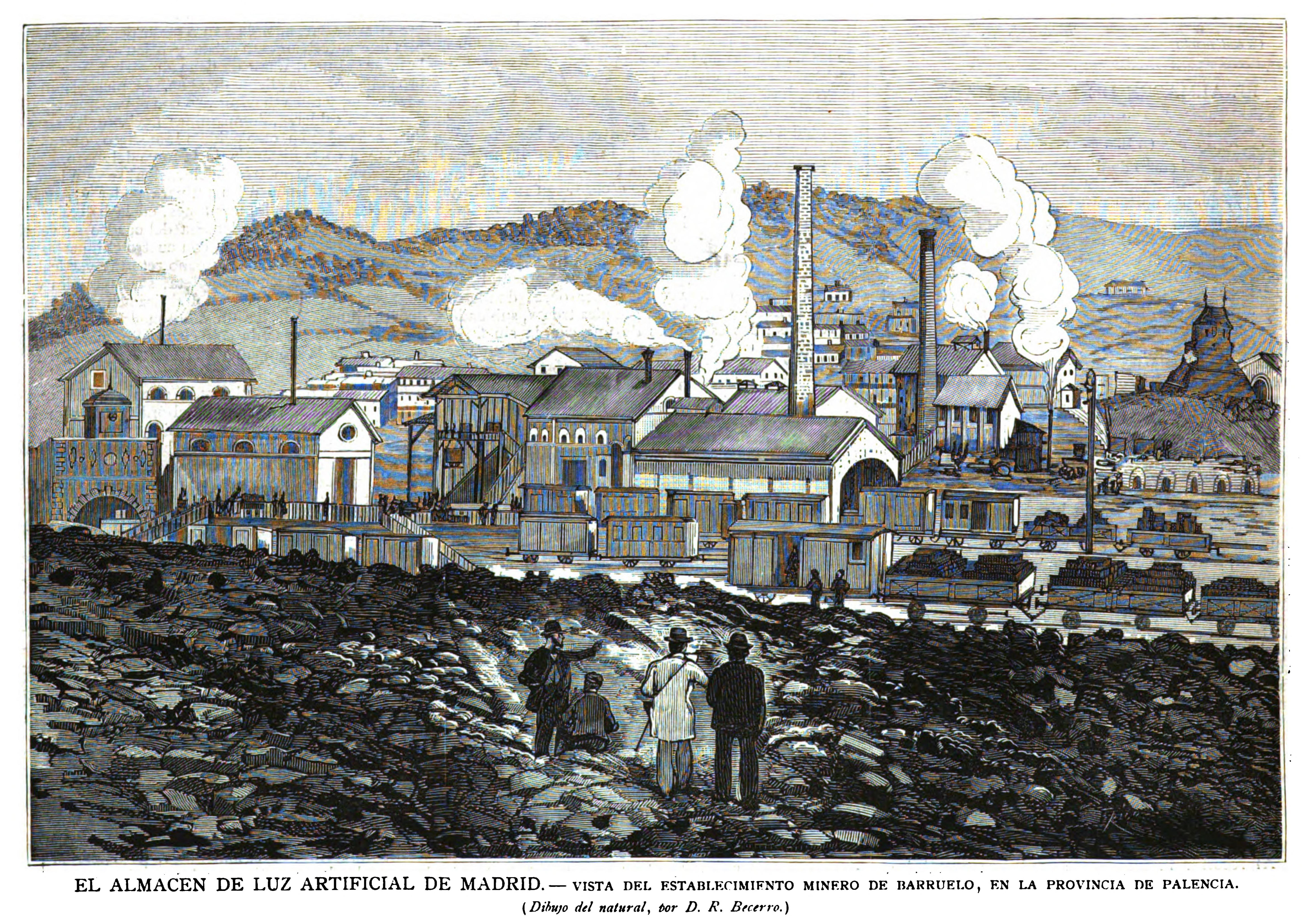 El almacén de luz artificial de Madrid.—Vista del establecimiento minero de Barruelo, en la provincia de Palencia.